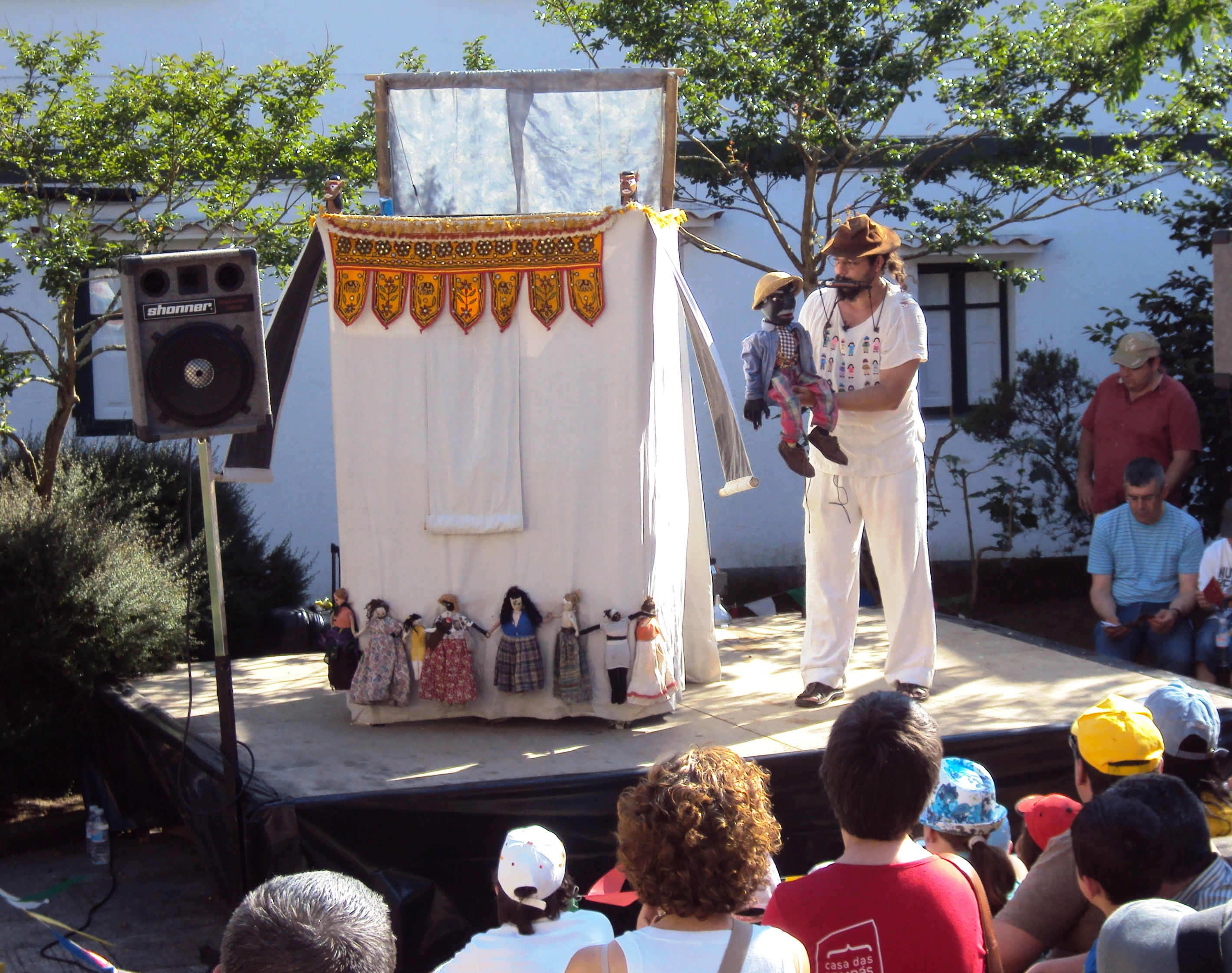 11 Festival Internacional de Títeres de Redondela, maio de 2010. "Logo do seu paso pola École des Arts Superieurs de la Marionnette de Charleville-Mezières, en Francia, Eder Paiva regresou á súa orixe, recuperando o universo inxenuo do mamulengo brasileiro, unha arte tradicional que reflicte con sagacidade o ambiente do mundo rural en Brasil. Máis que un simple espectáculo escénico, trátase dun xogo popular nacido da memoria dos escravos, que emprega disciplinas diversas: música, teatro, maxia, ventriloquia... 'Mamulengo Jatoba' (monicreques de luva e outros) A historia de Jatoba, colorida e festiva, entre imaxinaria e realista, invita con moito humor a penetrar no mundo árido e feliz do Nordeste brasileiro. Non faltan os diálogos e improvisacións co público, tan queridos a este teatro de monecos tradicionais."